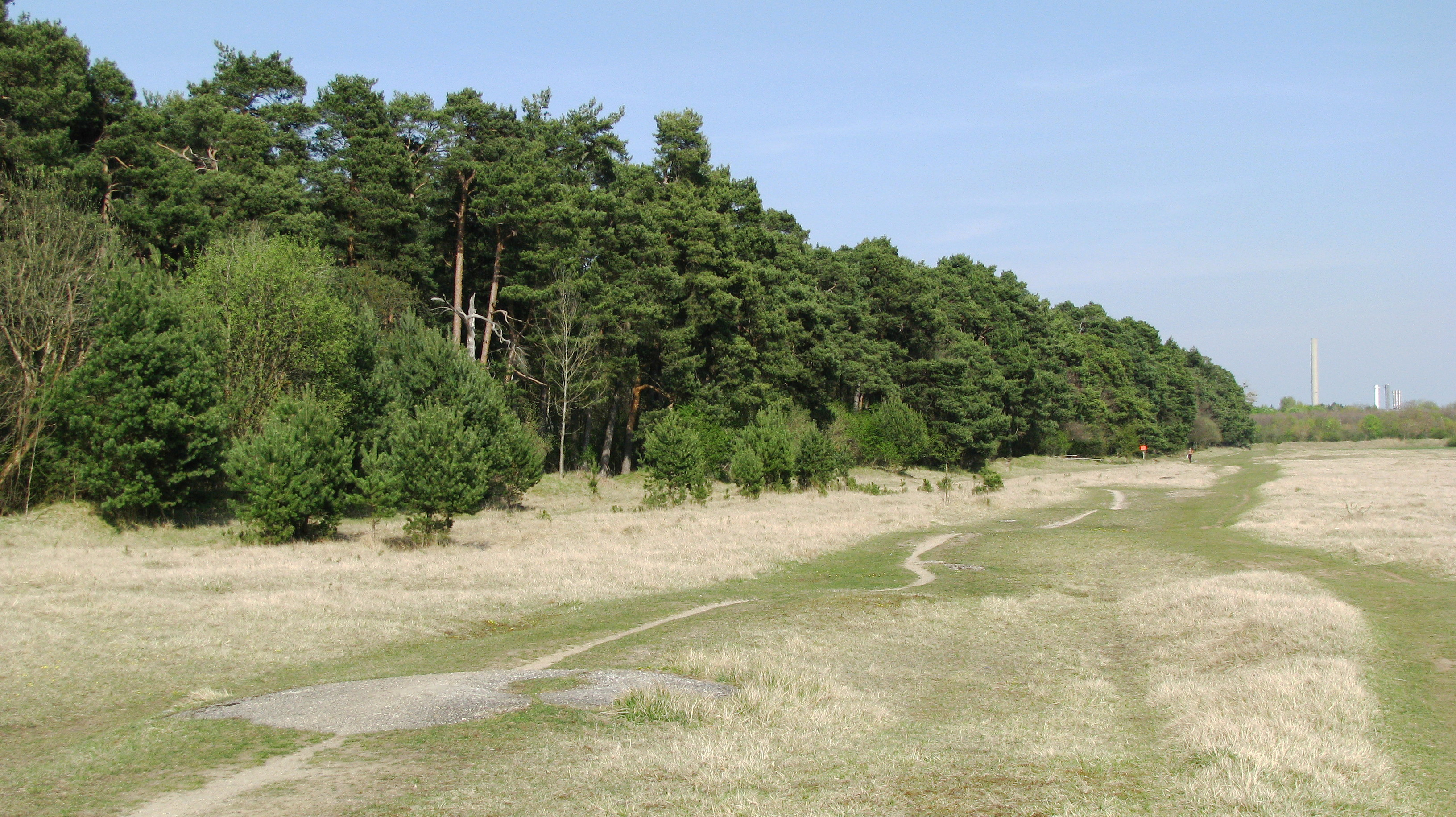 Südrand des Hartelholz und Panzerwiese.